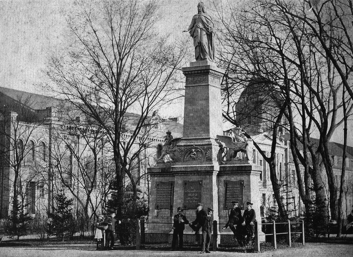 Historisches Foto von Güstrow. Blick über die Wallanlage auf das Ehrenmal für die Gefallenen des Krieges, das am 2.September 1876 enthüllt wurde. Der Gesamtentwurf stammt von Baurat Georg Daniel, die Figur der Viktoria modellierte Bildhauer Alexander Calandrelli, die Herstellung erfolgte in der Tonwarenfabrik Ernst March in Berlin. Der Abriss erfolgte im Jahr 1910 wegen größerer Schäden. Ein neues Denkmal entwarf der Bildhauer Wilhelm Wandschneider. - OpenStreetMap(Info)